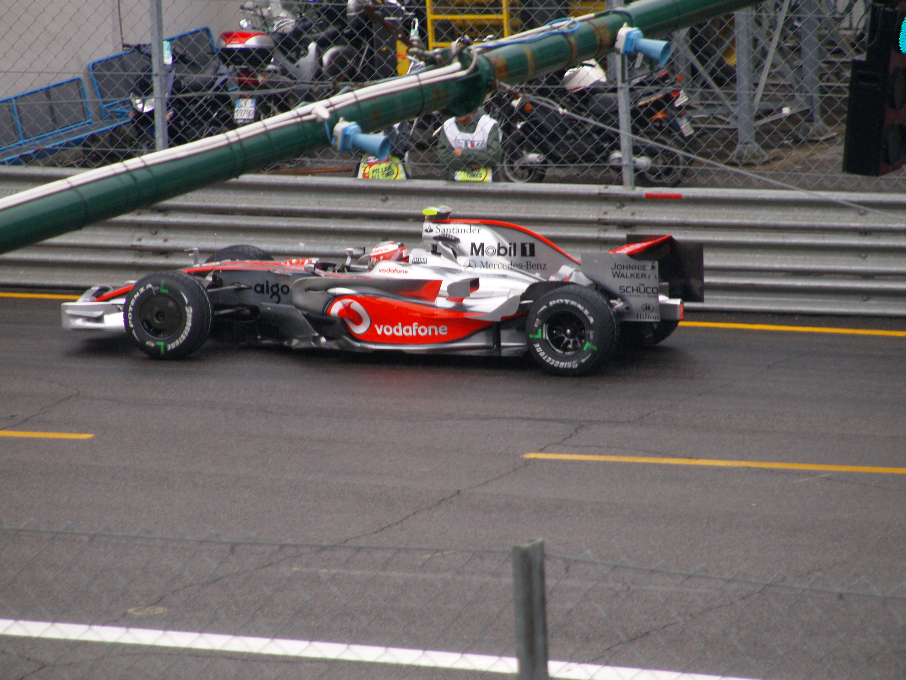 Heikki Kovalainen at 2008 Italian Grand Prix